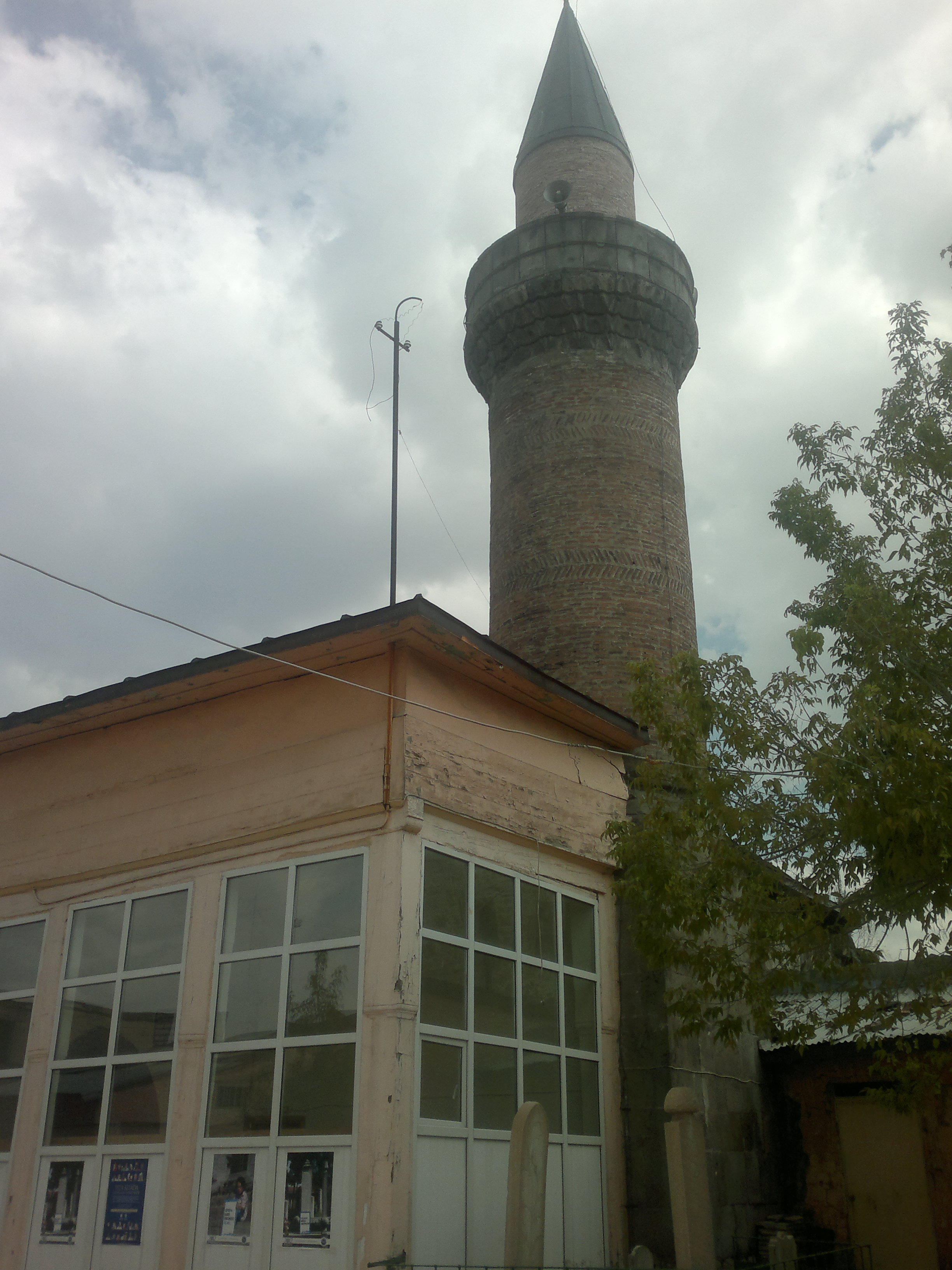 Erzurum Gürcü Mehmet Paşa Camii